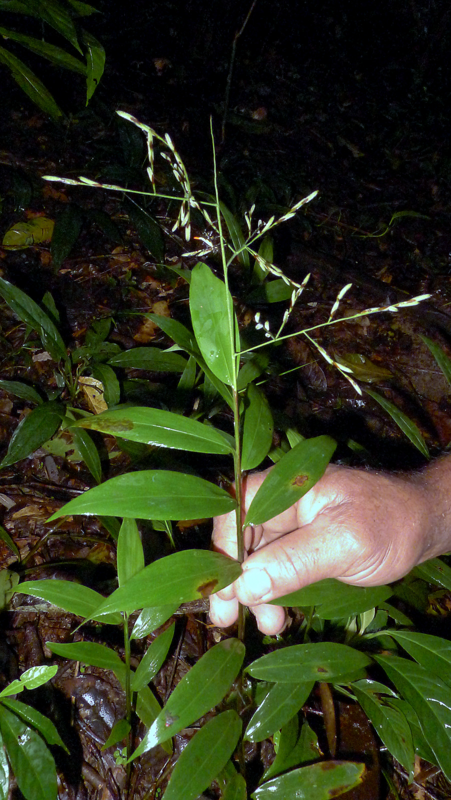 Pharus parvifolius Nash ssp. parvifolius Judz.